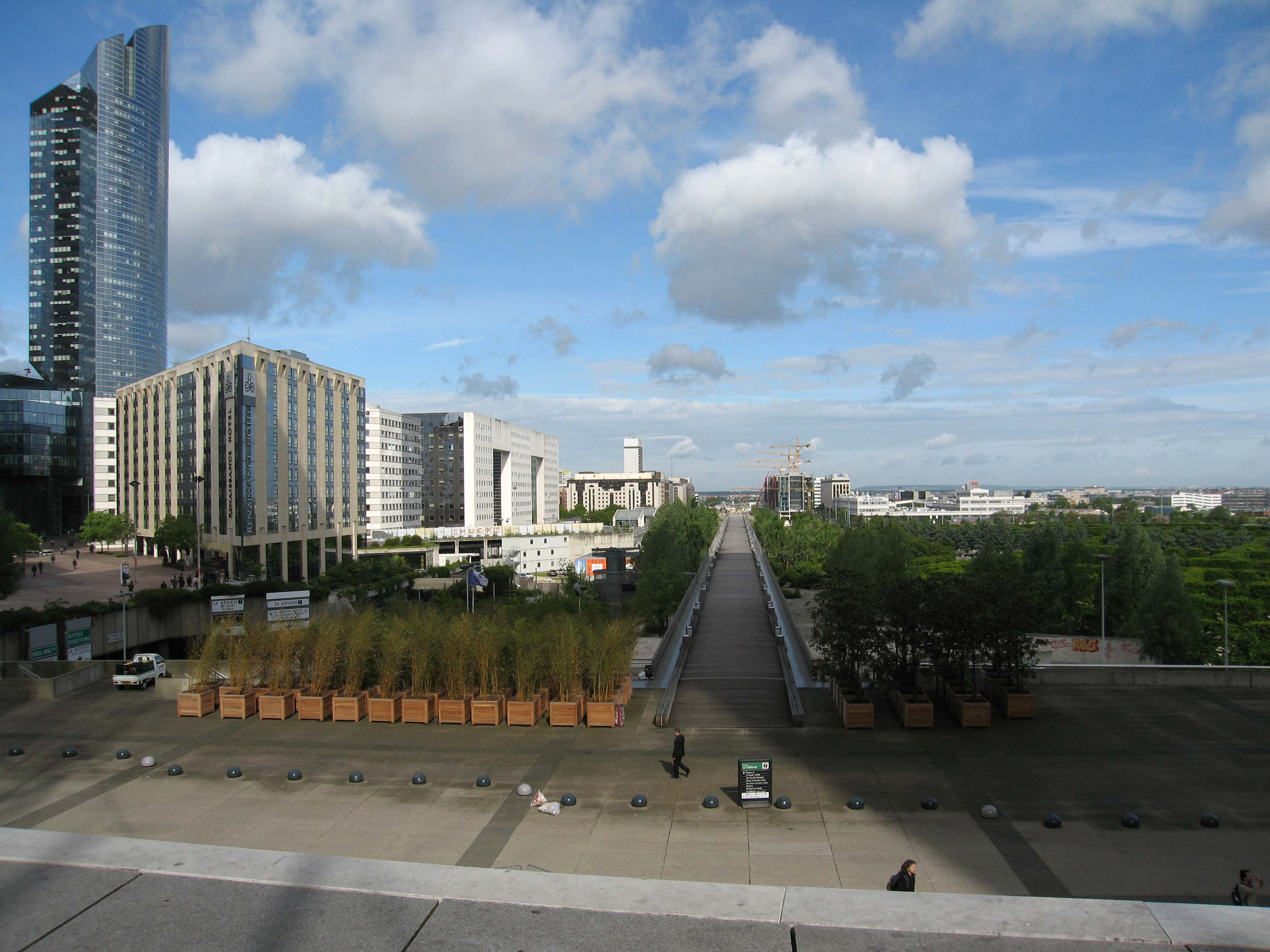 Axe historique au dela de la Défense Lieu : La Défense, France Date : 2006 Author : Pline photo ou réalisation (schéma) personnelle